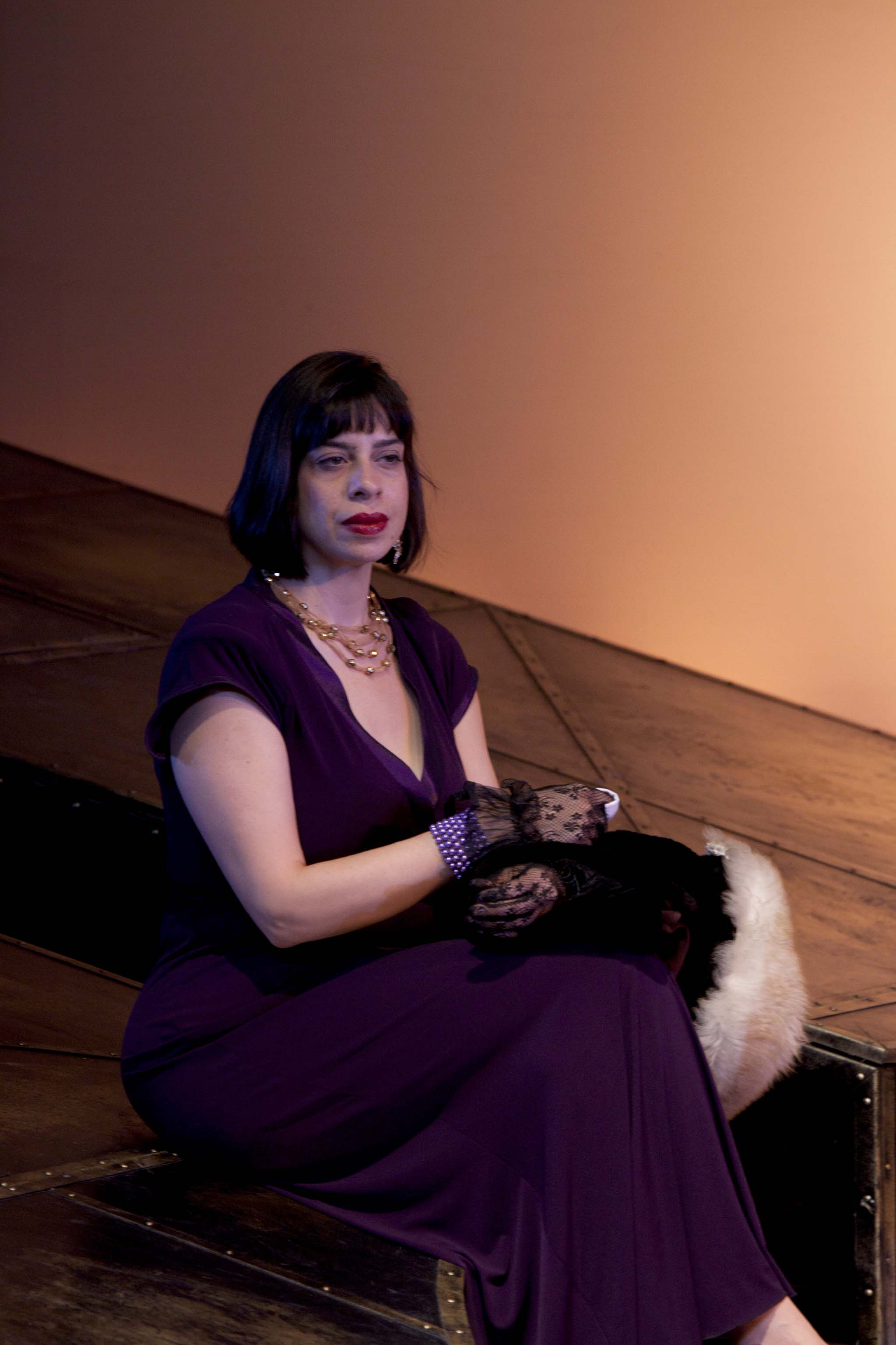 עדנה בליליוס במחזה הנסיכה איבון